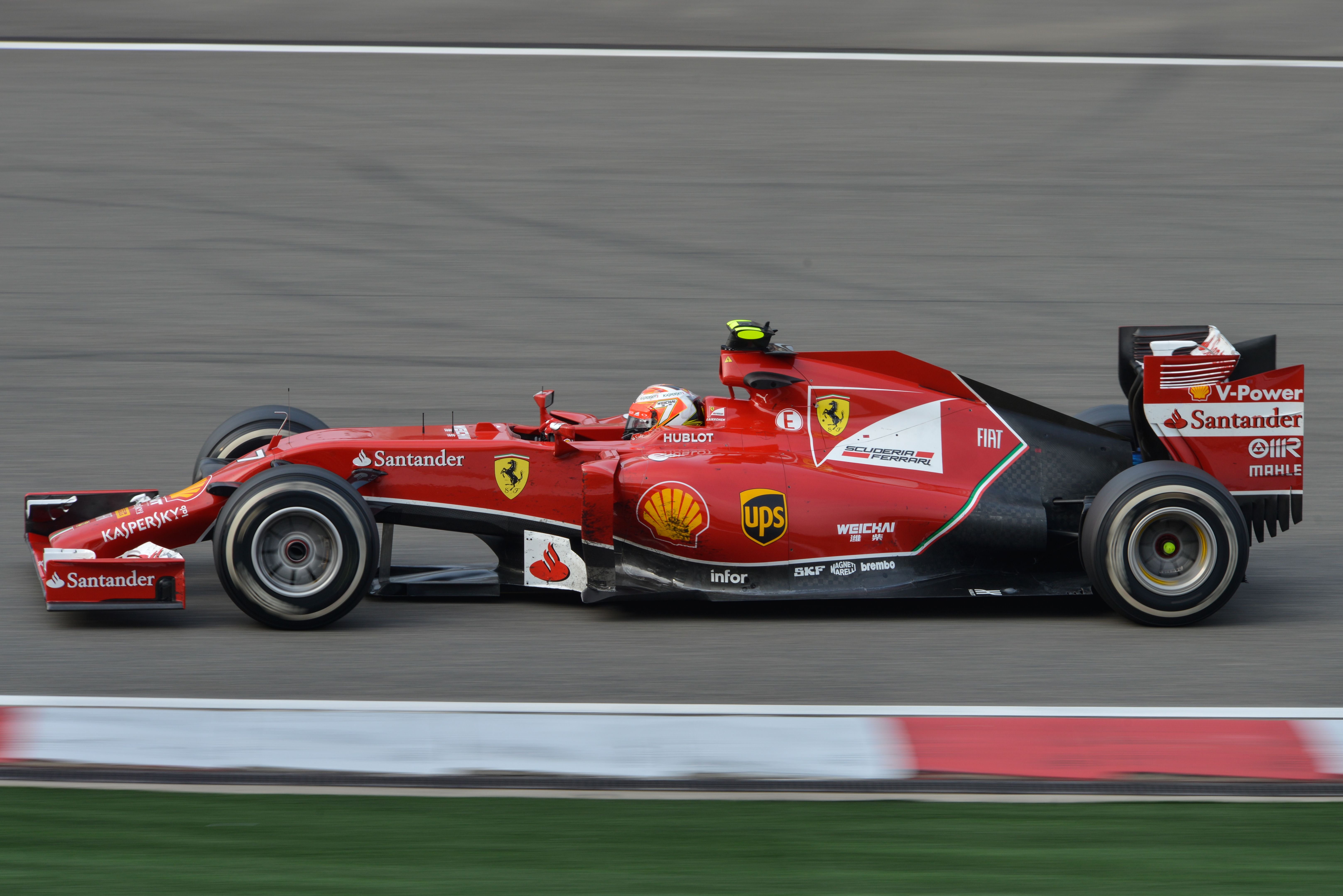 Ferrari F14 T Kimi Raikkonen 2014 F1 Chinese GP